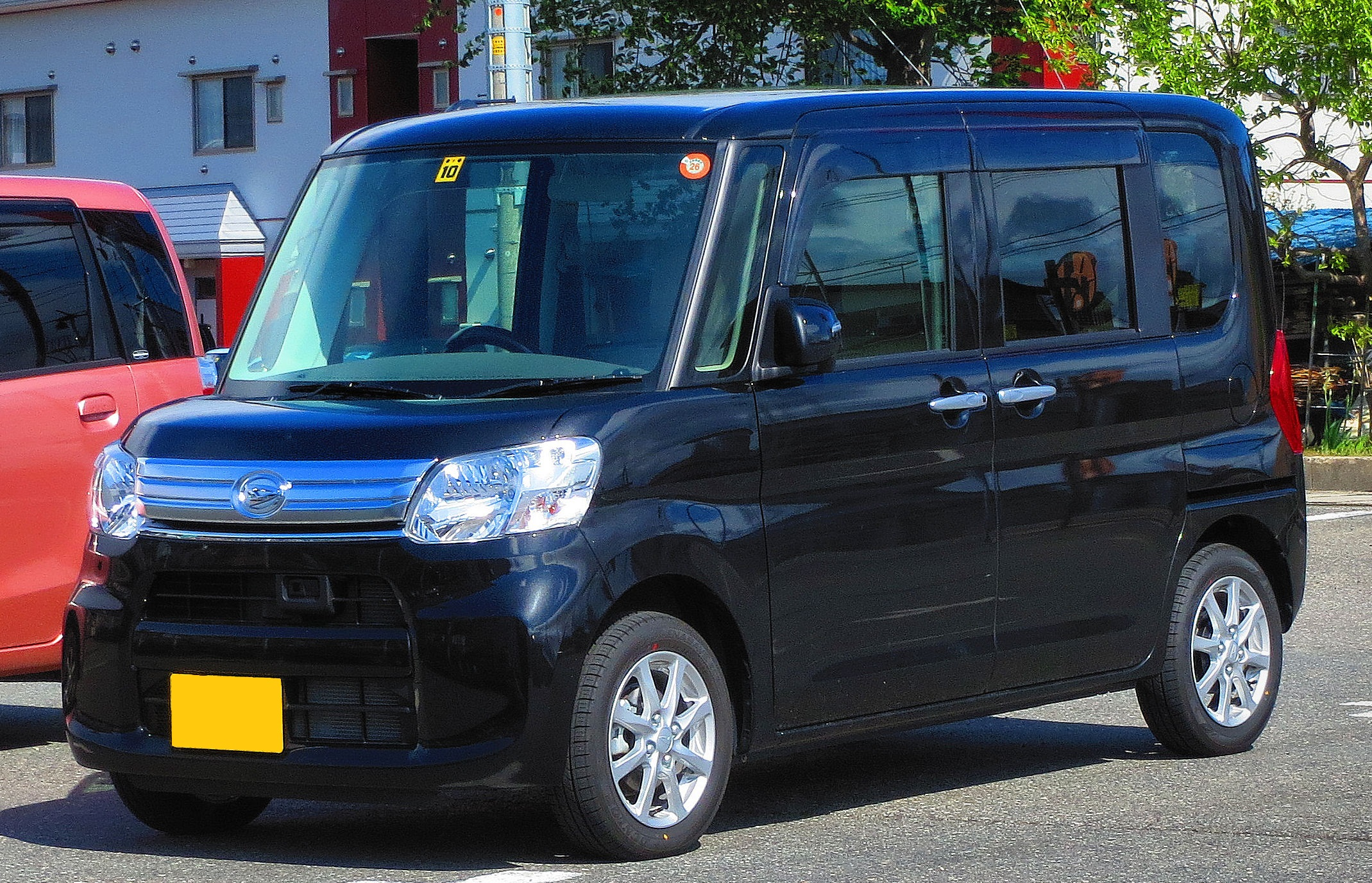 ダイハツ・タント G SA